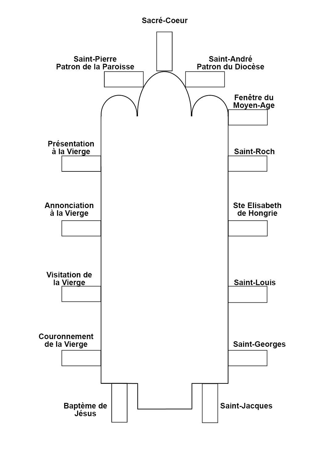 Détail des vitraux Cadaujac